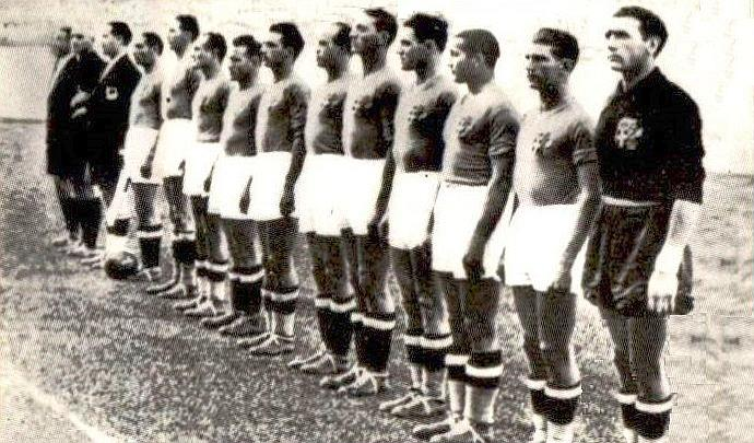 L'équipe d'Italie championne du monde de football en 1938 à Paris.